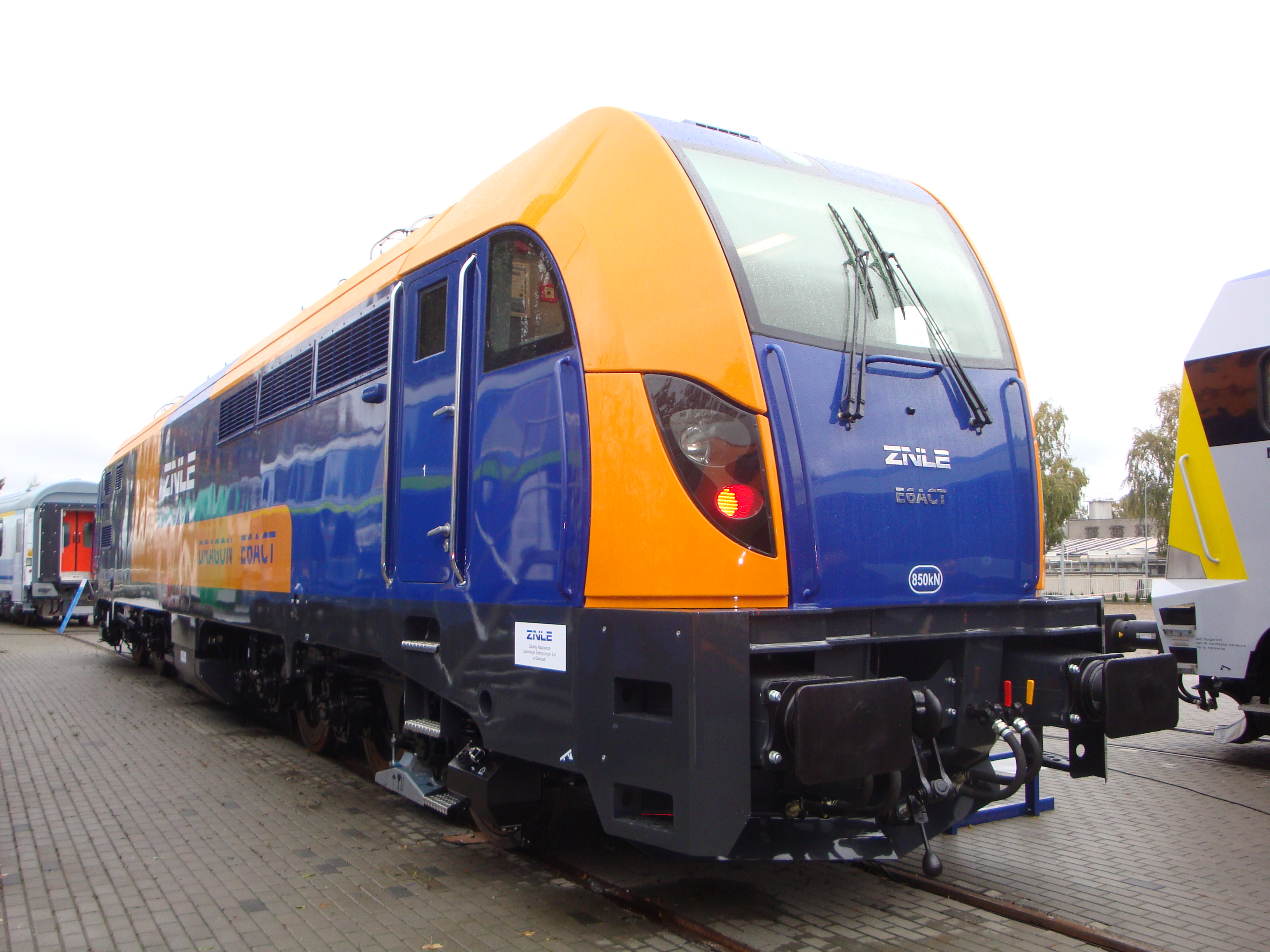 Lokomotywa elektryczna E6ACT Dragon prezentowana podczas targów kolejnictwa "Trako" w Gdańsku.